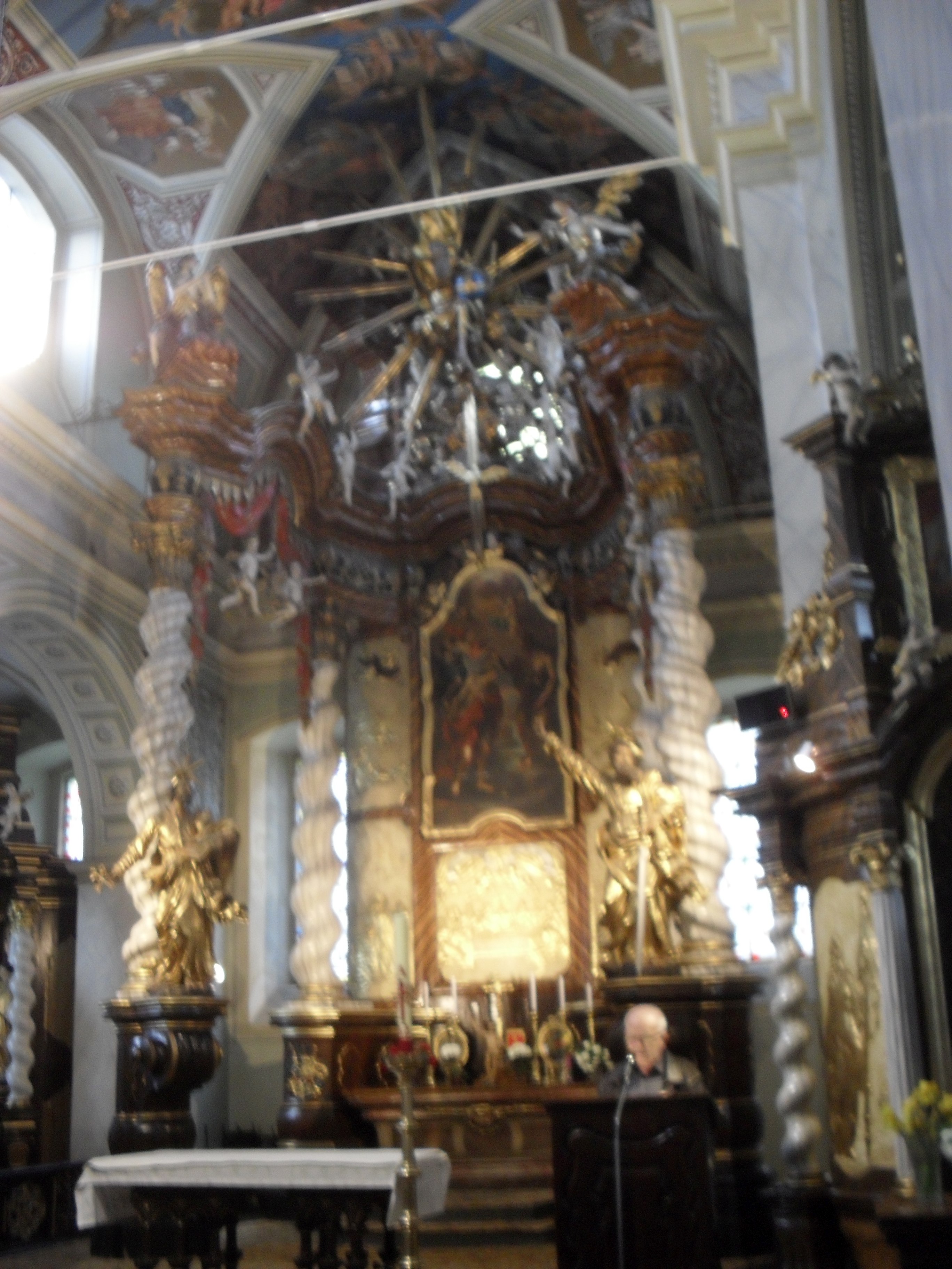 Teplický kostel svatého Jana Křtitele.